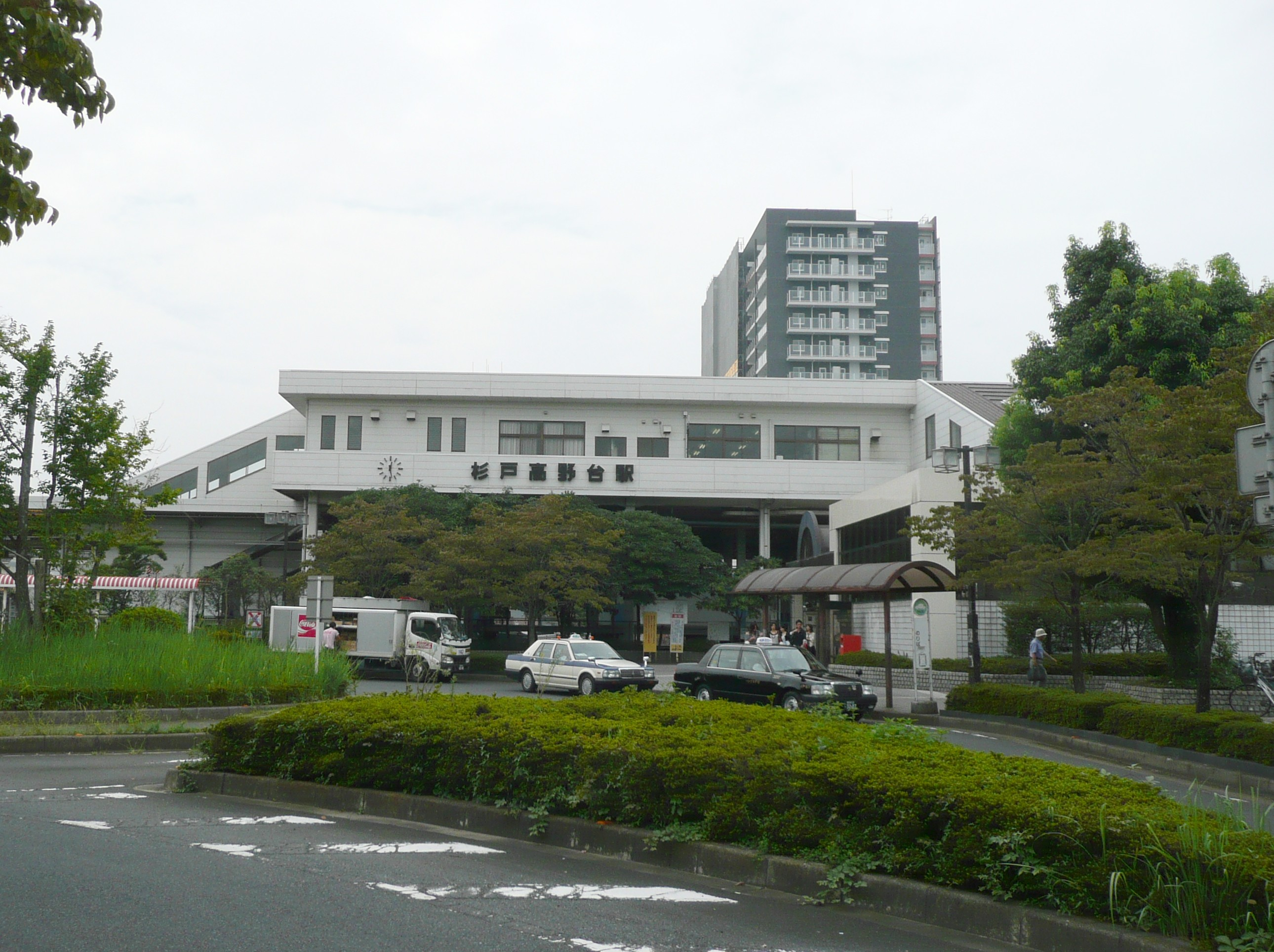 杉戸高野台駅東口